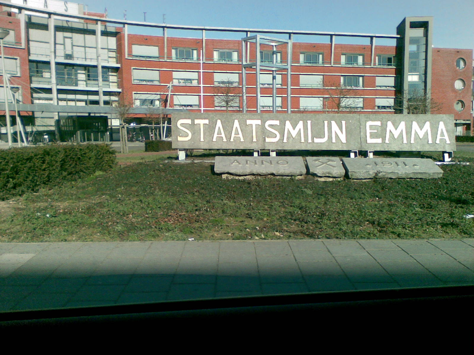 enig overgebleven restanten van de Staatsmijn Emma